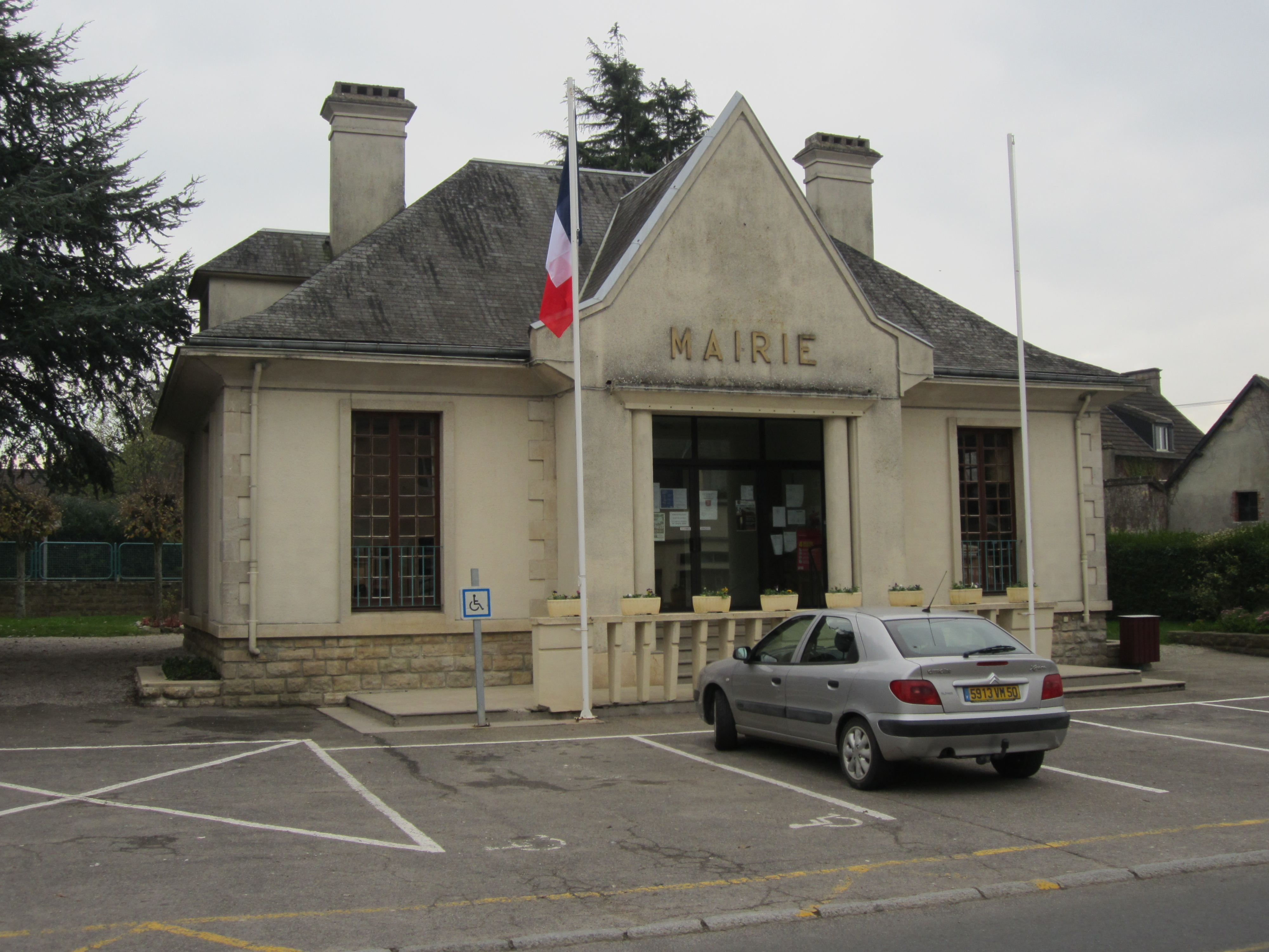 Chef-du-Pont, Manche